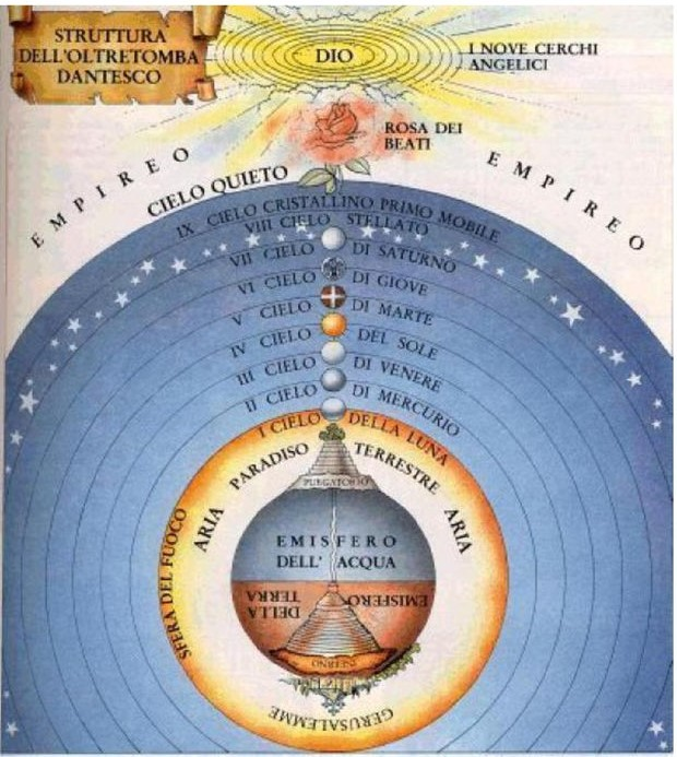 Struttura dell'oltretomba dantesco: orbe terracqueo circondato dall'aria, dalla sfera del fuoco, dai nove cieli del Paradiso, e dall'Empireo.